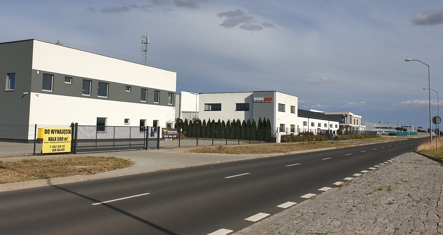 Firma Drog Bud